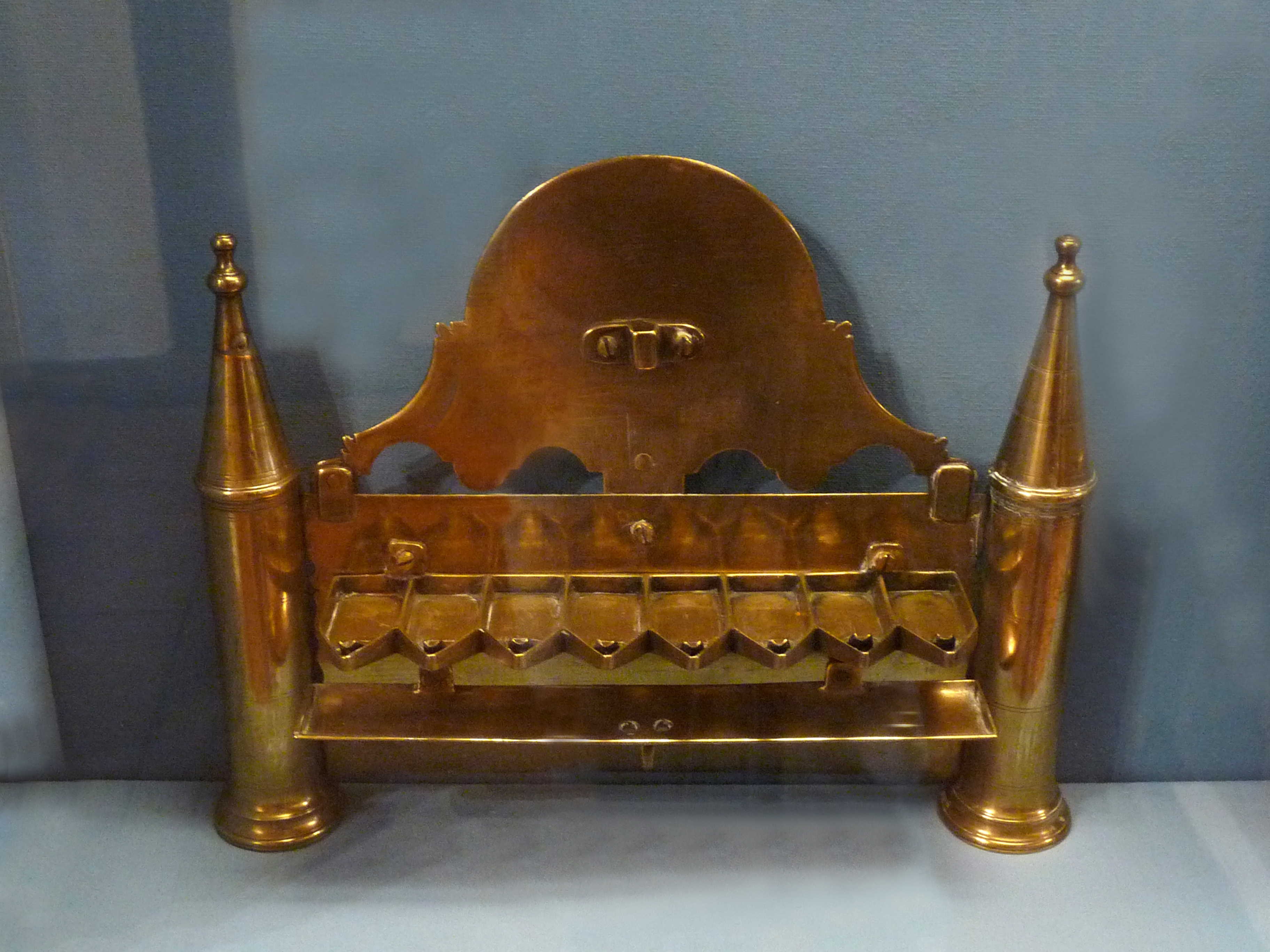 Lampe de 'Hanouccah (Musée alsacien de Strasbourg). Modèle flanqué de deux tourelles à toit pentu. Bronze, Alsace ?, 19e siècle.